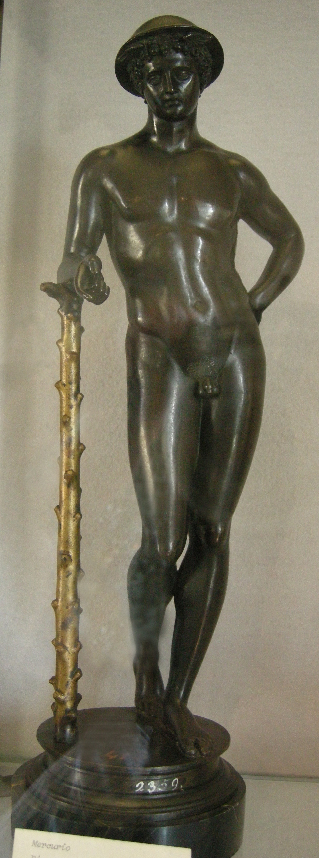 Pier jacopo alari detto l'antico, mercurio